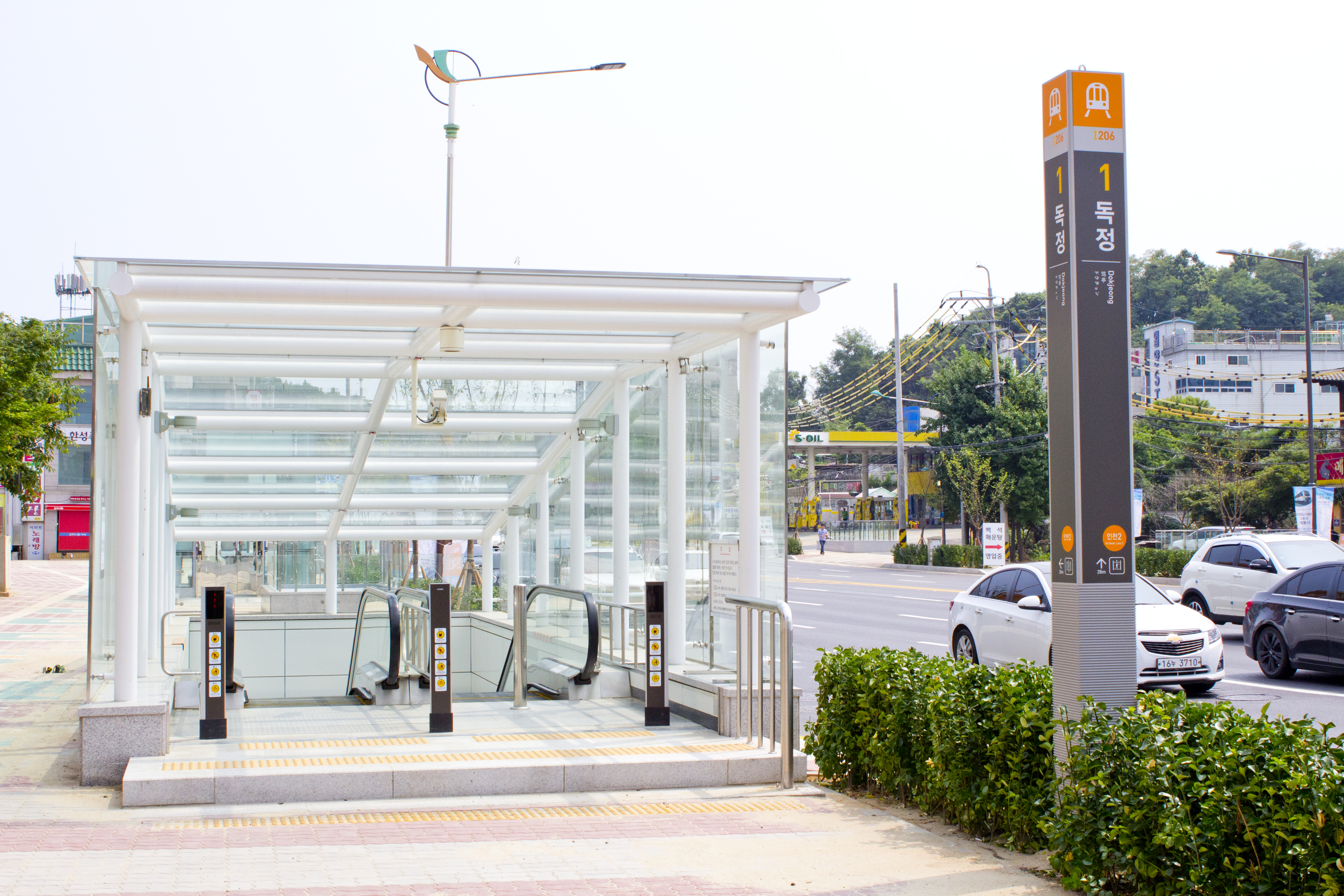 인천2호선 독정역 1번 출구